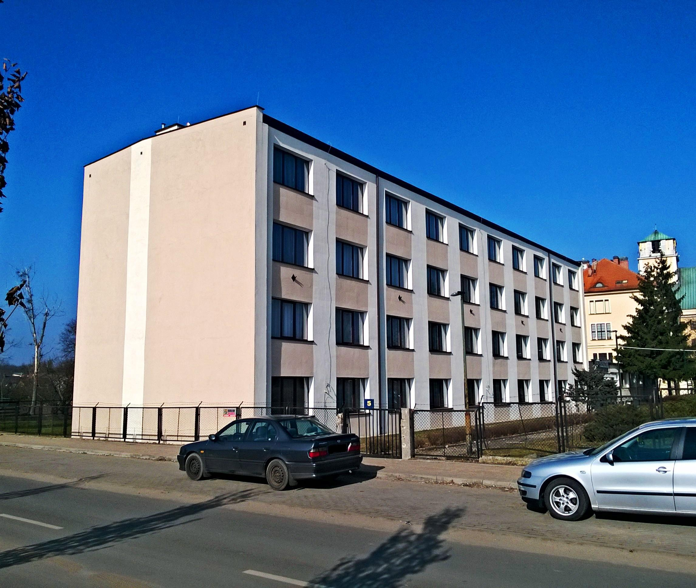 Dom Pielgrzyma w Toruniu